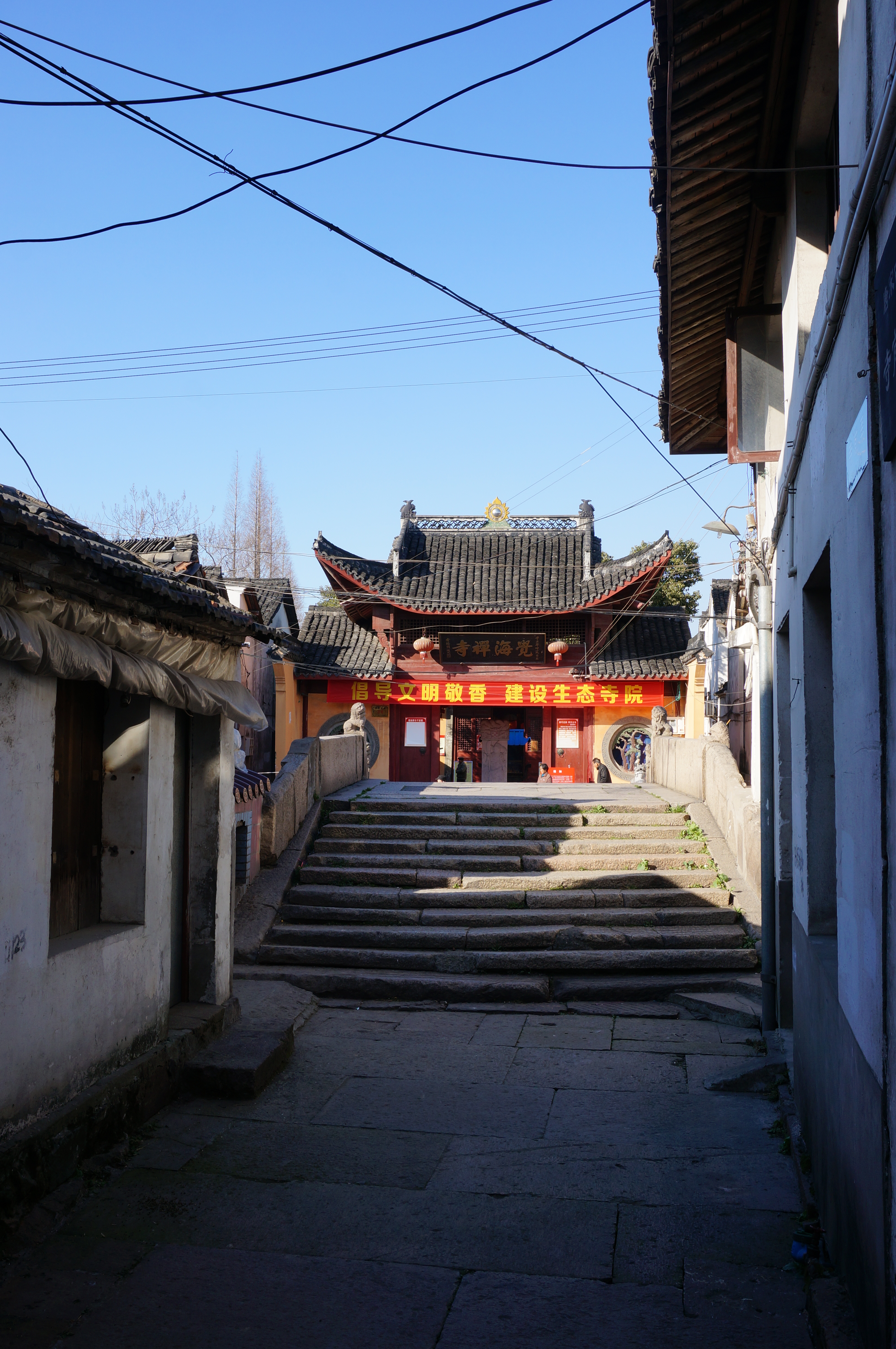 德清觉海禅寺，自迎圣桥南堍看山门。